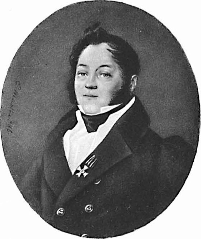 Князь Борис Антонович Четвертинский (1781-1865)